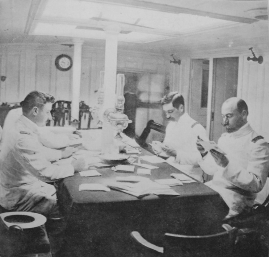 "Víctimas de la moda. El Capitán Irizar, el Teniente Hermelo y dos Oficiales en la Cámara de la «Uruguay» armando tarjetas postales."